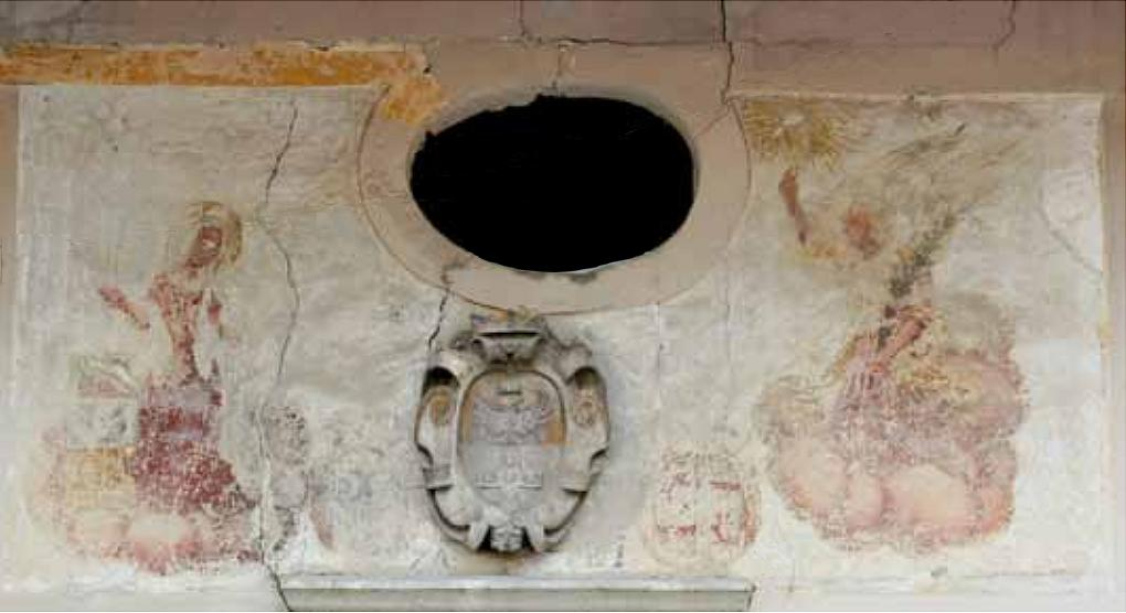 I pochi resti dell'affresco dell'Annunciazione e lo stemma Piccolomini sulle canonica di Sant'Egidio ad Ospedaletto nel Principato Vescovile di Trento (1709)